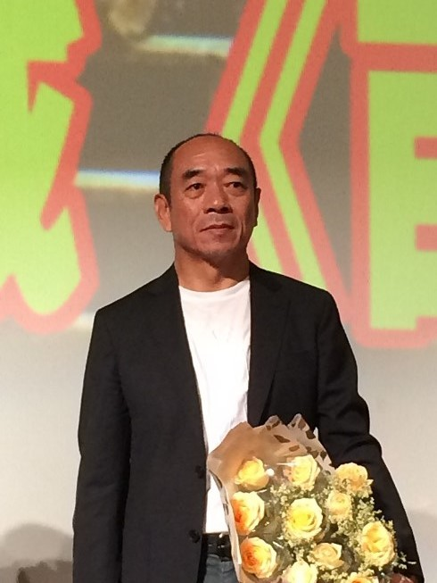 电影百团大战剧组，在南京金陵工人影城